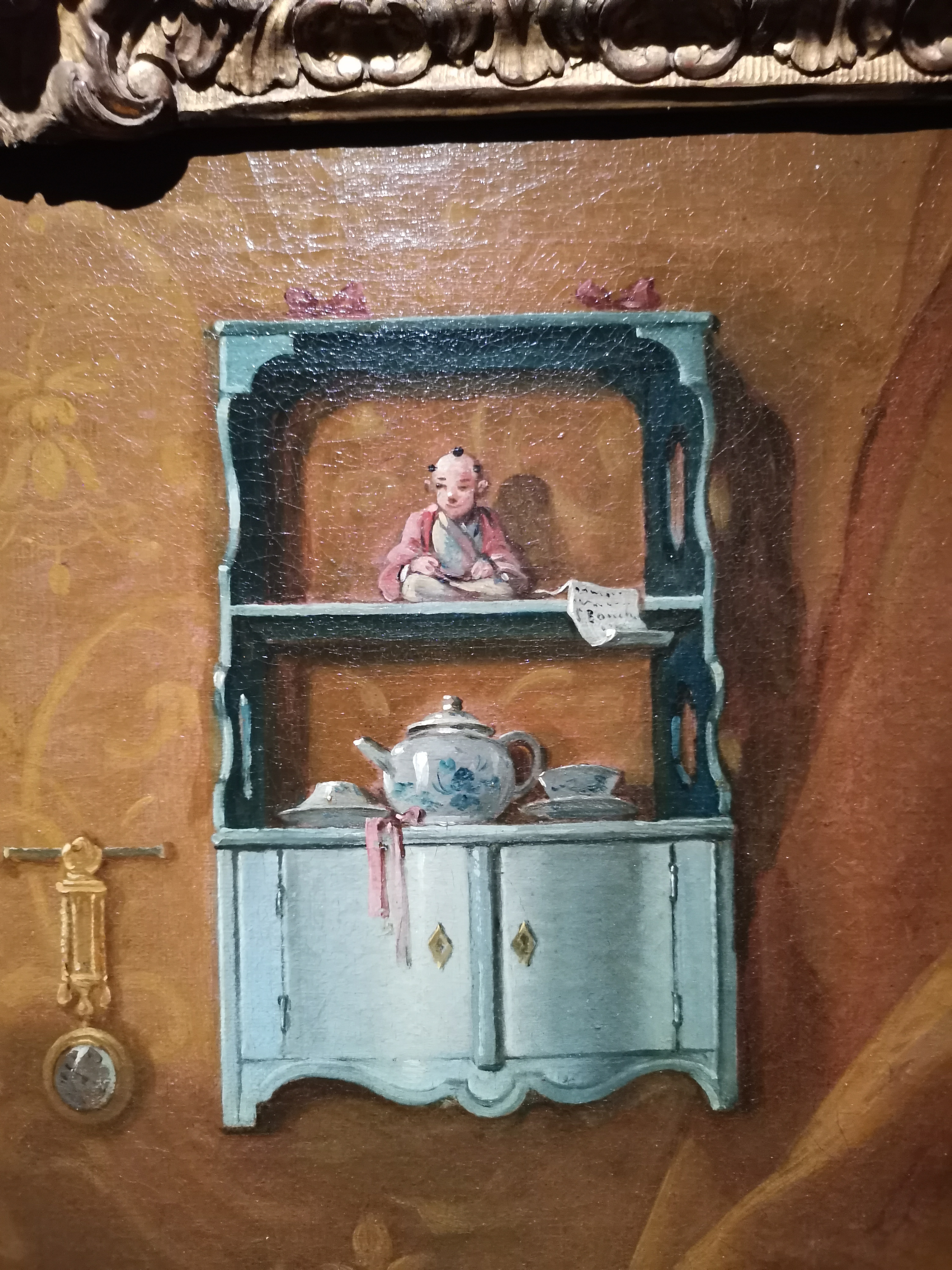 Détail de la Chinoiserie du tableau de François Boucher, femme allongée dur son divan (Frick Collection)